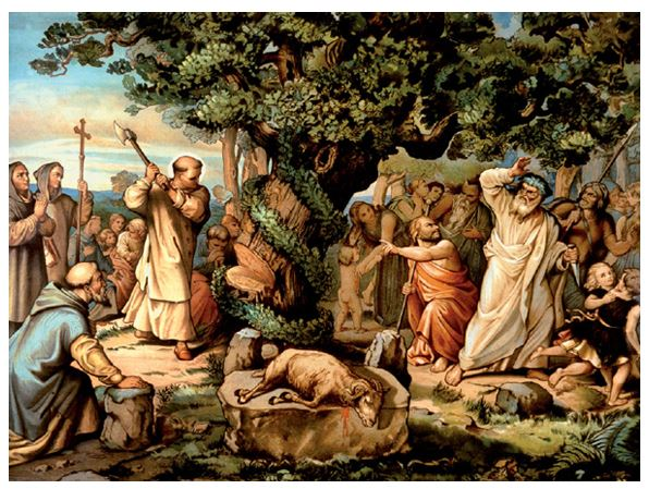 Bonifatius fällt die Donarseiche. Farblithographie nach einem Gemälde von Heinrich Maria von Hess 1834/44